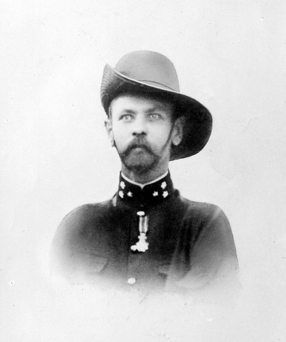 Negatief. Studioportret van H.F. Aukes, 1ste luitenant der Marechaussee en drager van de Militaire Willemsorde